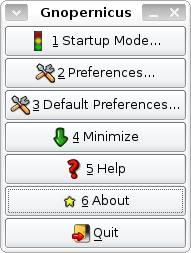 gnopernicus 1.0 interface gtk2 avril 2006 Licensing Catégorie:Image de logiciel libre